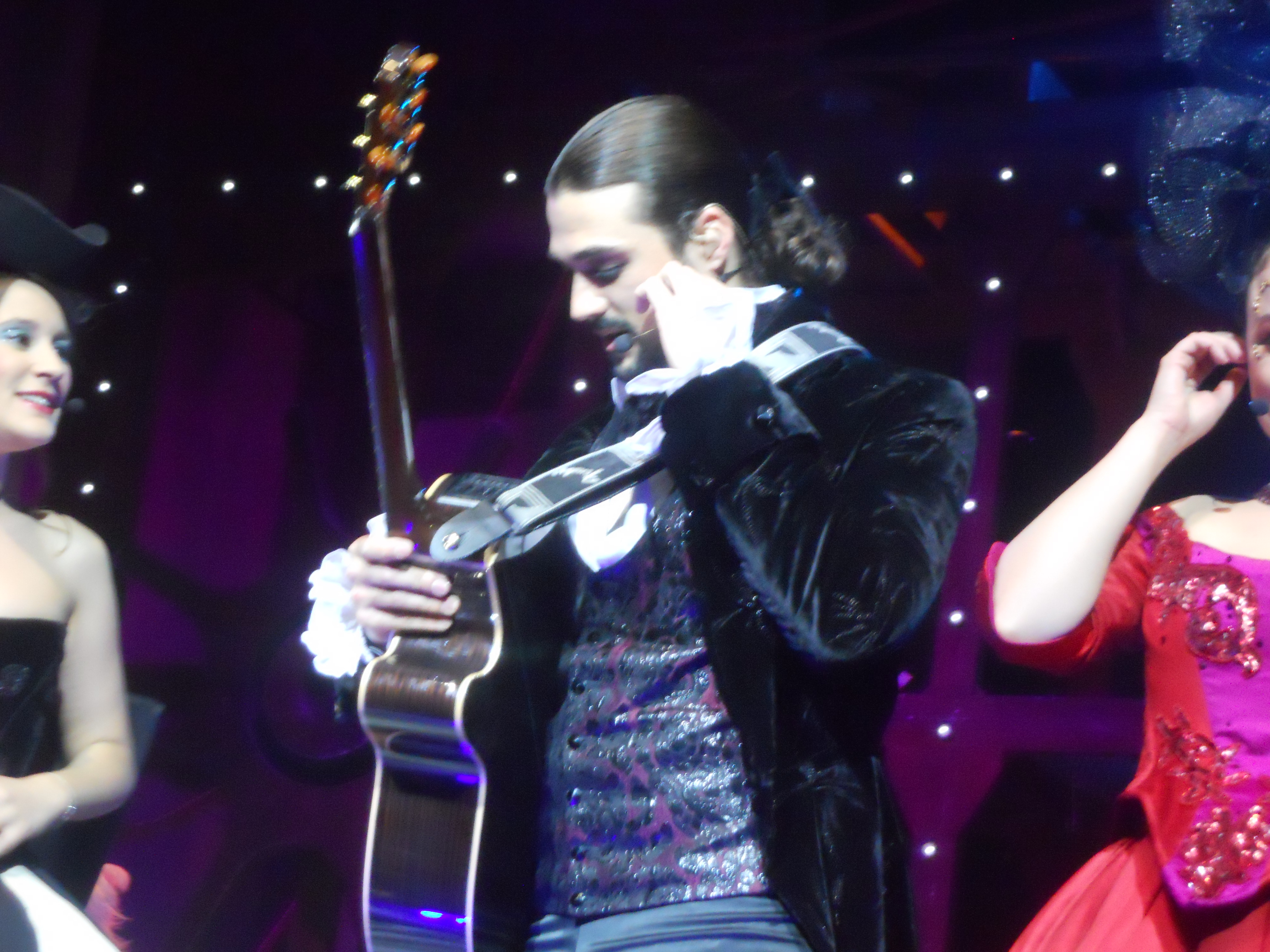 Florent Mothe lors du final de Mozart l'Opéra Rock le 2 Avril 2011